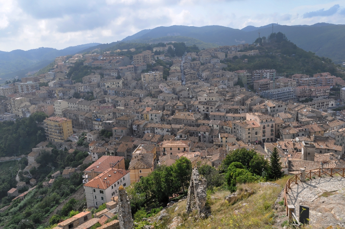 Tolfa 2014